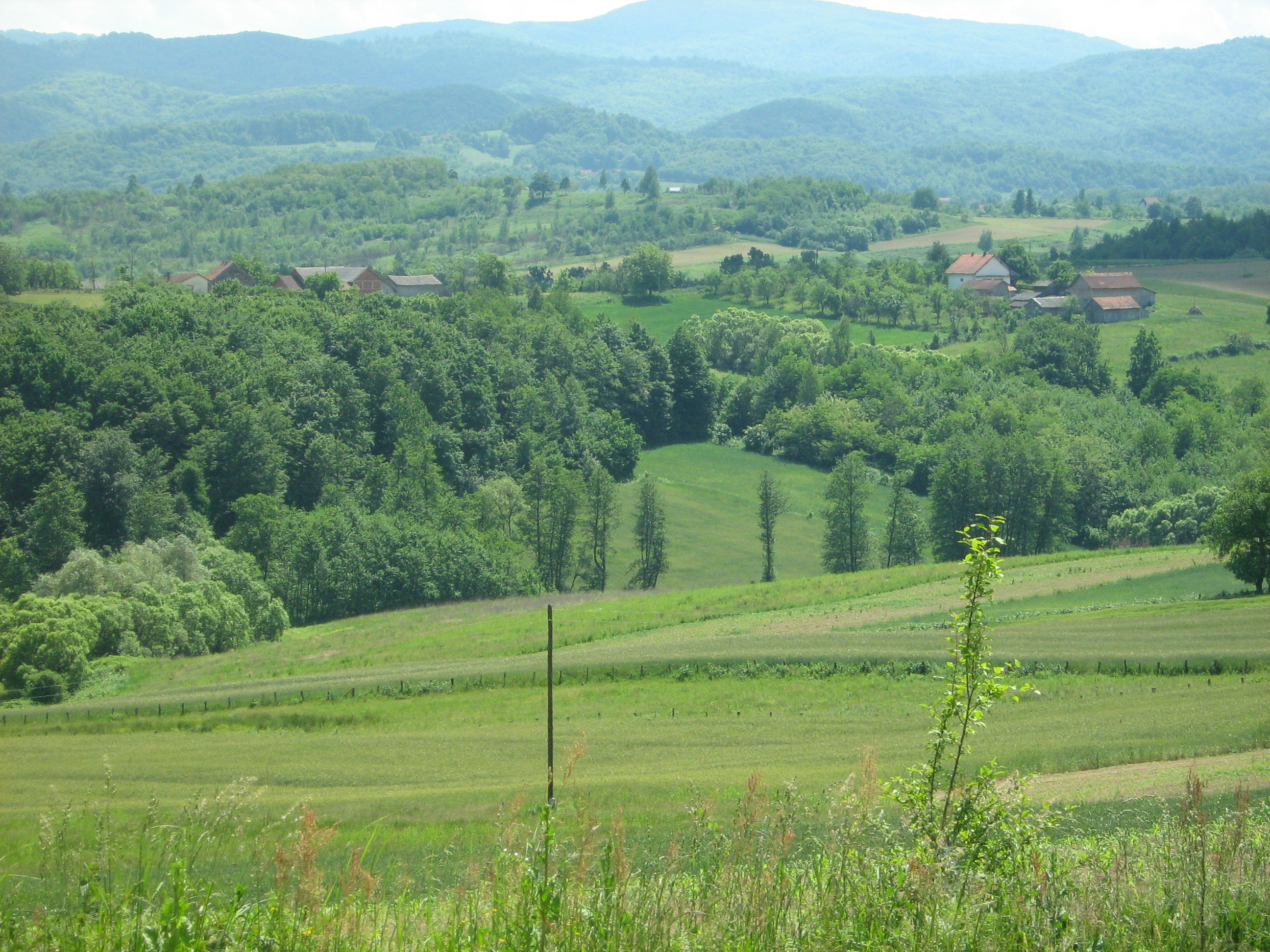 Сам сам сликао